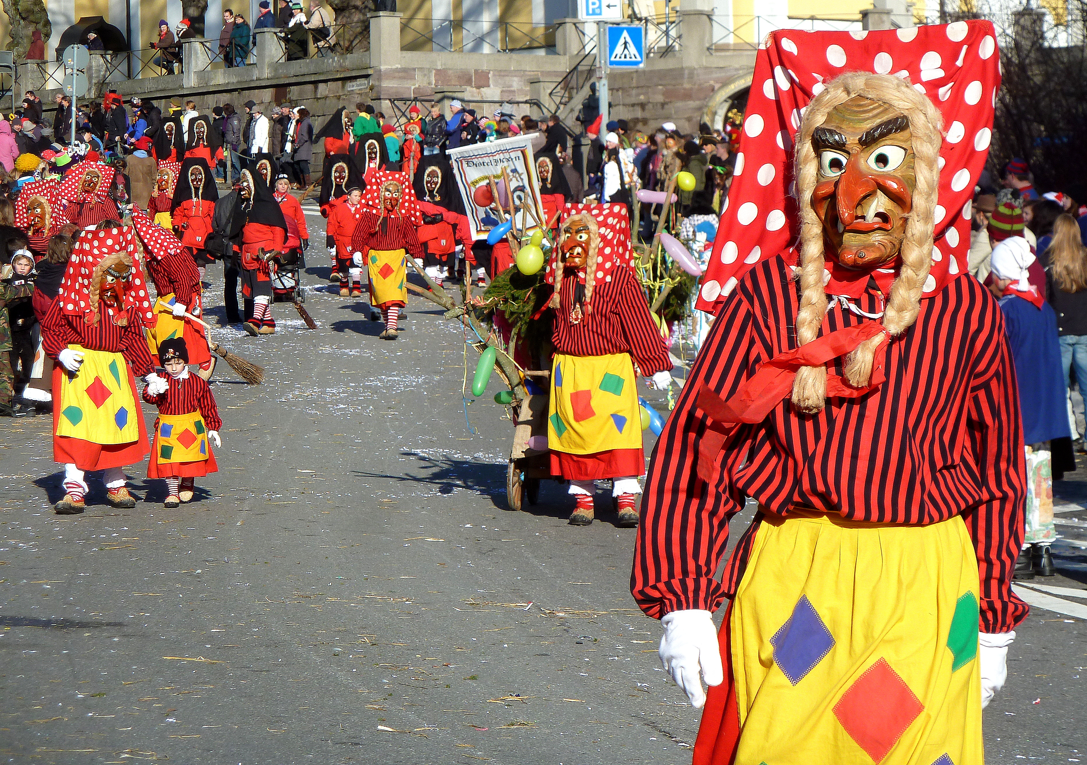 Shellenberg Hexen Feb 19, 2012, 10-38 AM